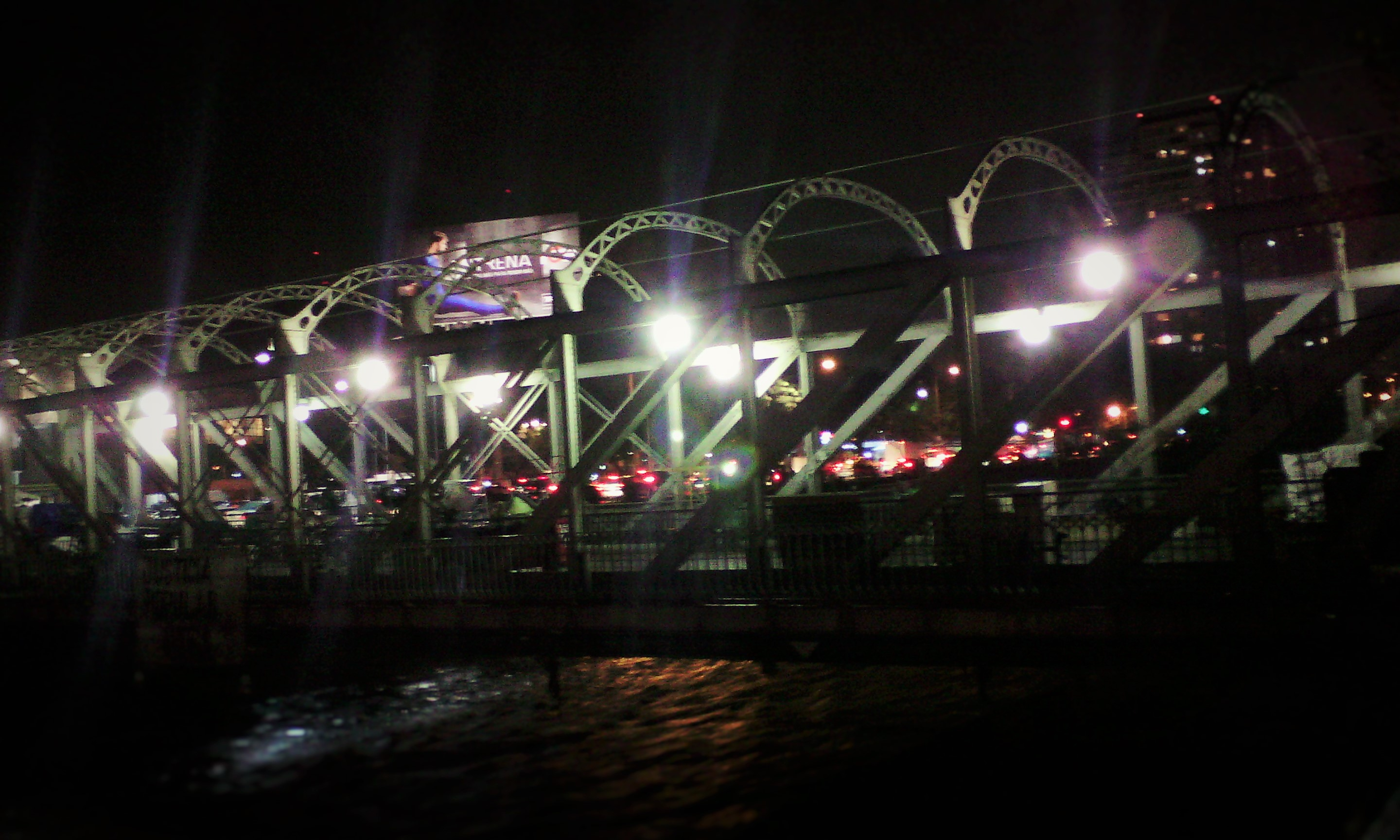 puente